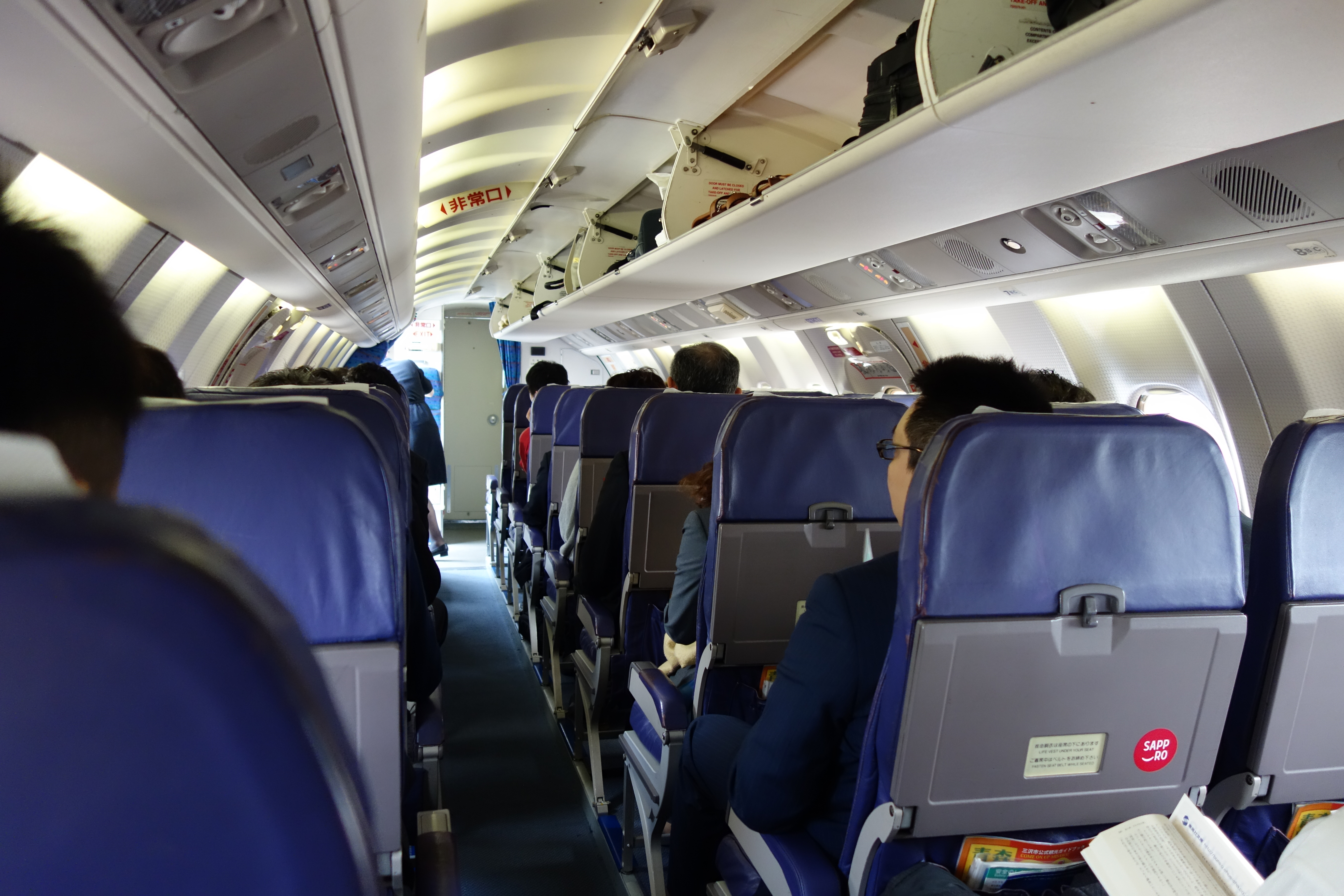 HAC 340B-WT (JA03HC) 機内 （2013年6月20日、丘珠→函館）